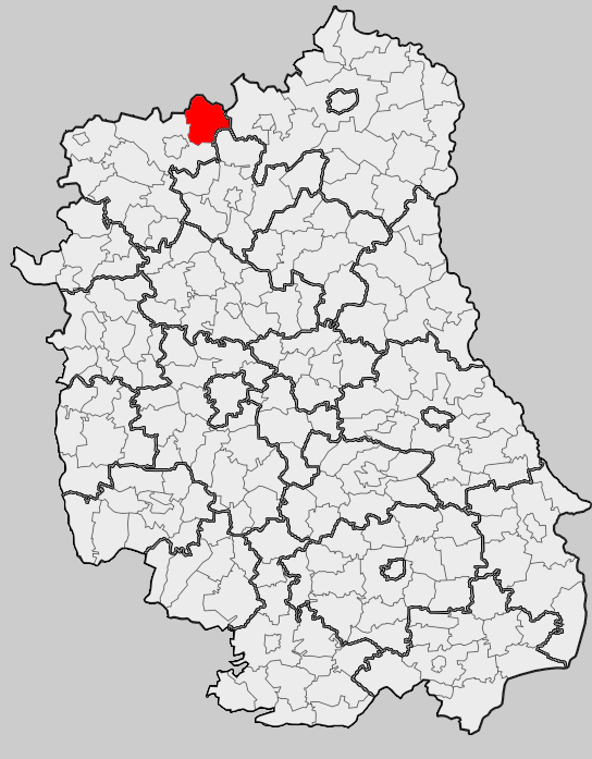 Map of gmina Trzebieszów, Łuków county, Lublin voivodship Mapa gminy Trzebieszów, powiat łukowski, województwo lubelskie